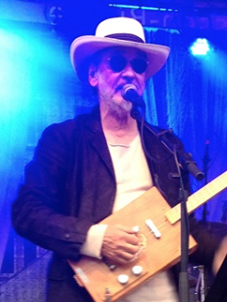 Friedel Geratsch in Saarbrücken, Altstadtfest 2018